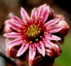 Blüte von Sempervivum arachnoideum × montanum (= Sempervivum × barbulatum). Man sieht zwei Kreise Staubblätter (= männliche Geschlechtsorgane, gelblich) und einen Kreis Fruchtblätter (= weibliche Geschlechtsorgane, grünlich). Die Vormännlichkeit gewährleistet, dass Selbst-Befruchtung weit gehend vermieden wird.